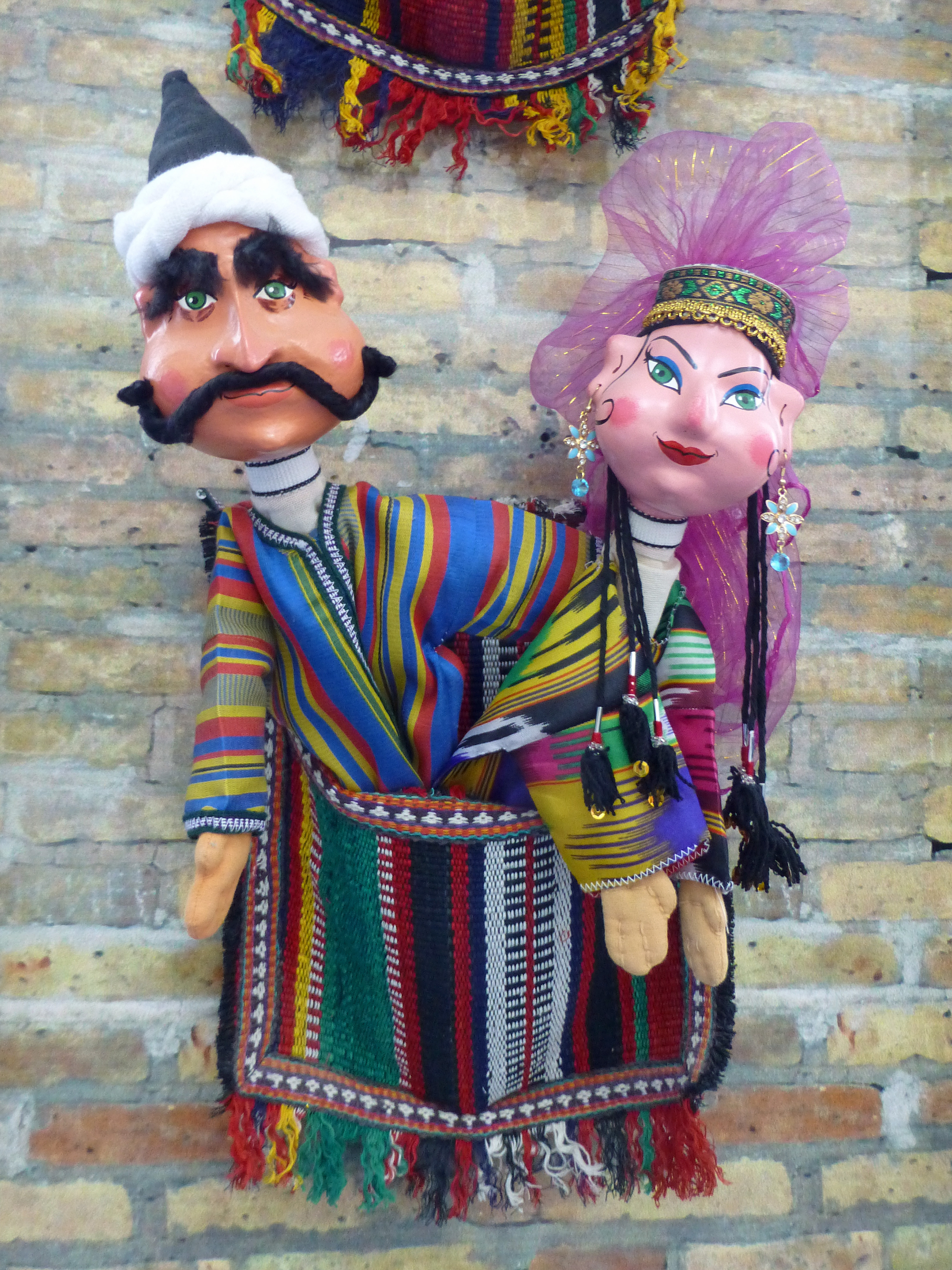 Marionnettes de Boukhara (Ouzbékistan)